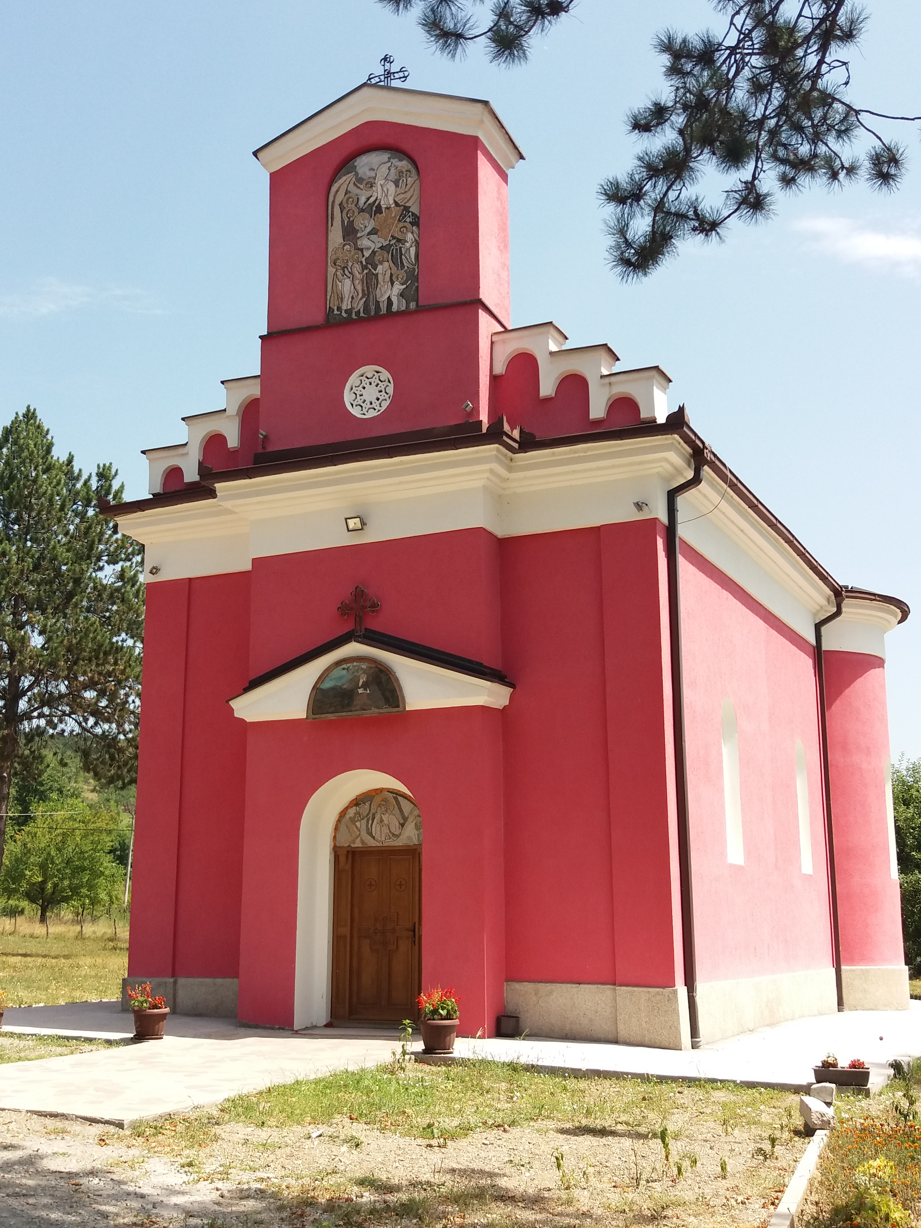 Srpski (latinica): Crkva Svetog Proroka Ilije, Sirča